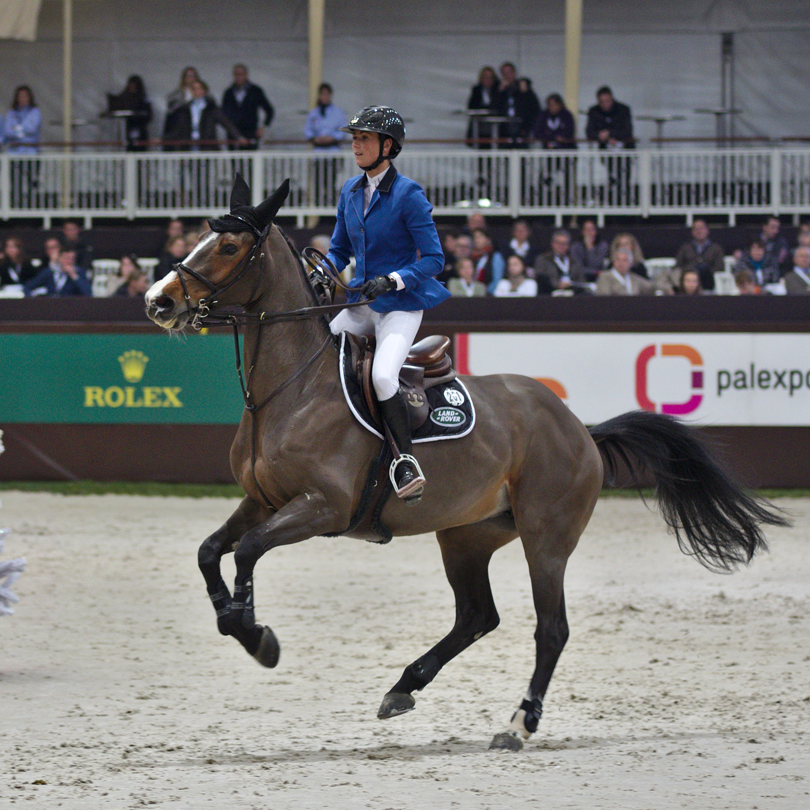 CHI Genève 2013 - 20131212 - Pénélope Leprevost et Nice Stéphanie